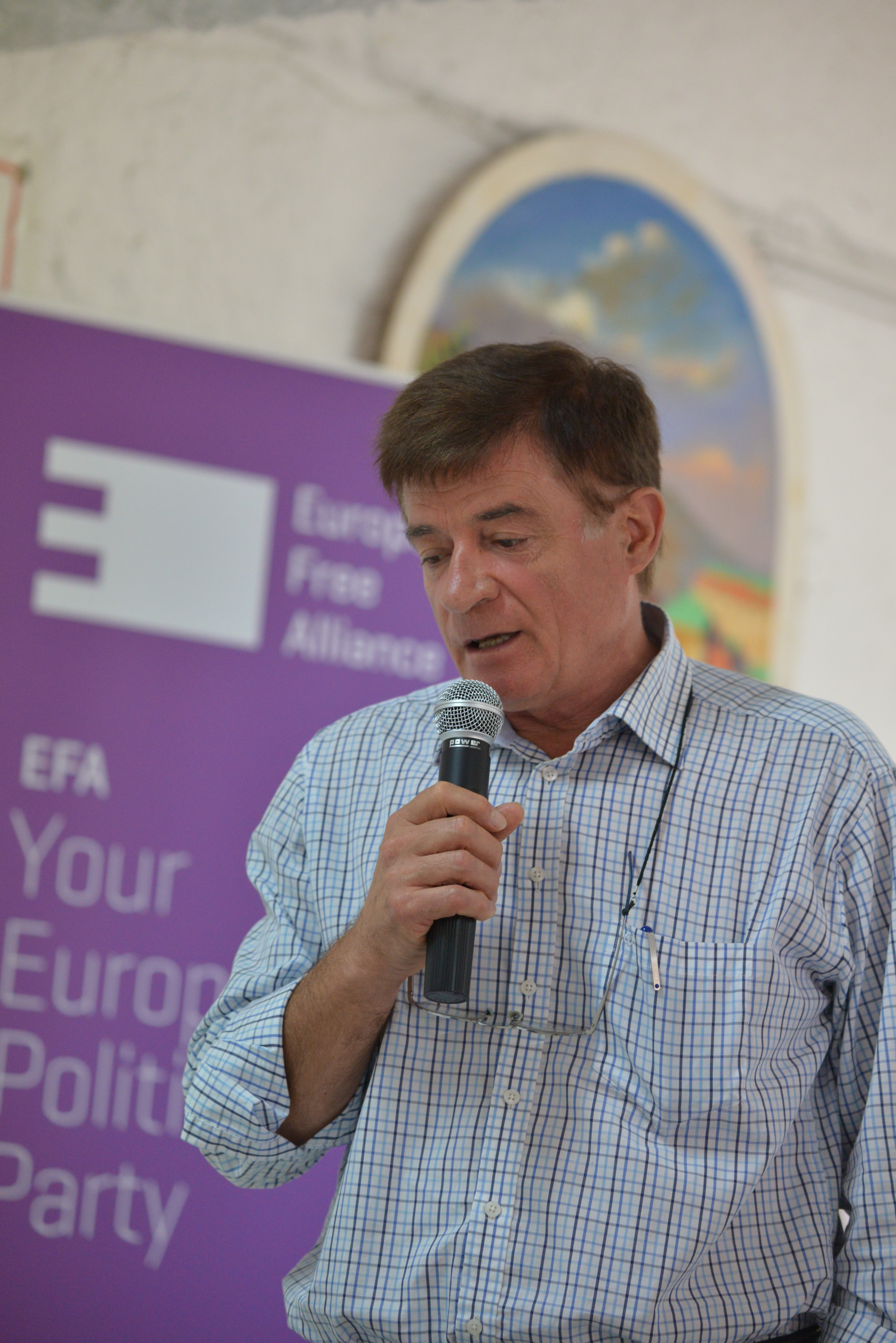 Gustave Alirol à l'occasion de l'université d'été de Régions et peuples solidaires en Corse le 25 août 2014